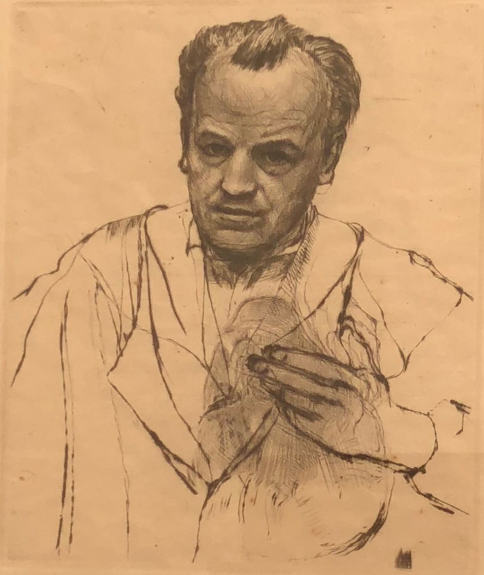 Självporträtt IX torrnål 150x127 mm